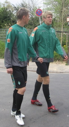 Peter Niemeyer und Markus Rosenberg